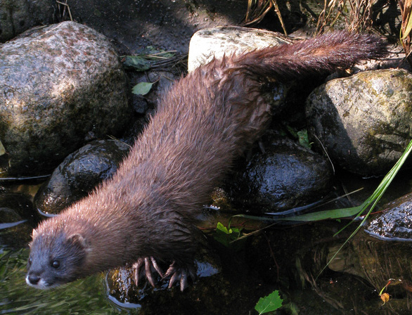 A European mink, Helsinki Zoo, Korkeasaari, Helsinki, Finland